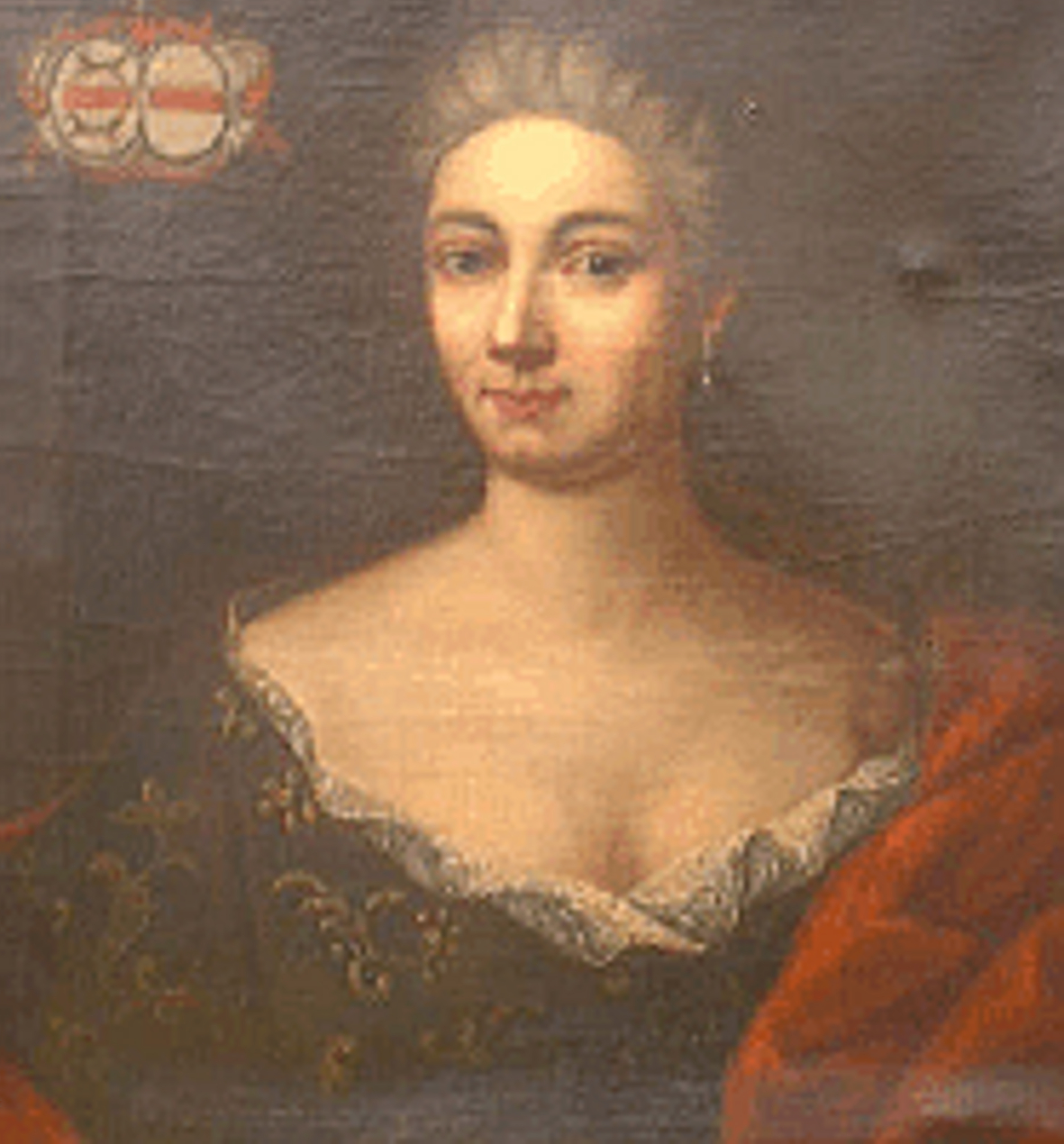 Porträt von Maria Anna Antonia v. Kleist, geb. Freiin v. Manteuffel aus der FG